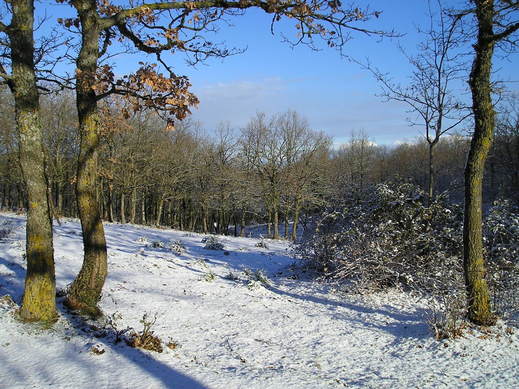 L'autore di quest'immagine è l'utente Gand, che la lascia nel pubblico dominio.